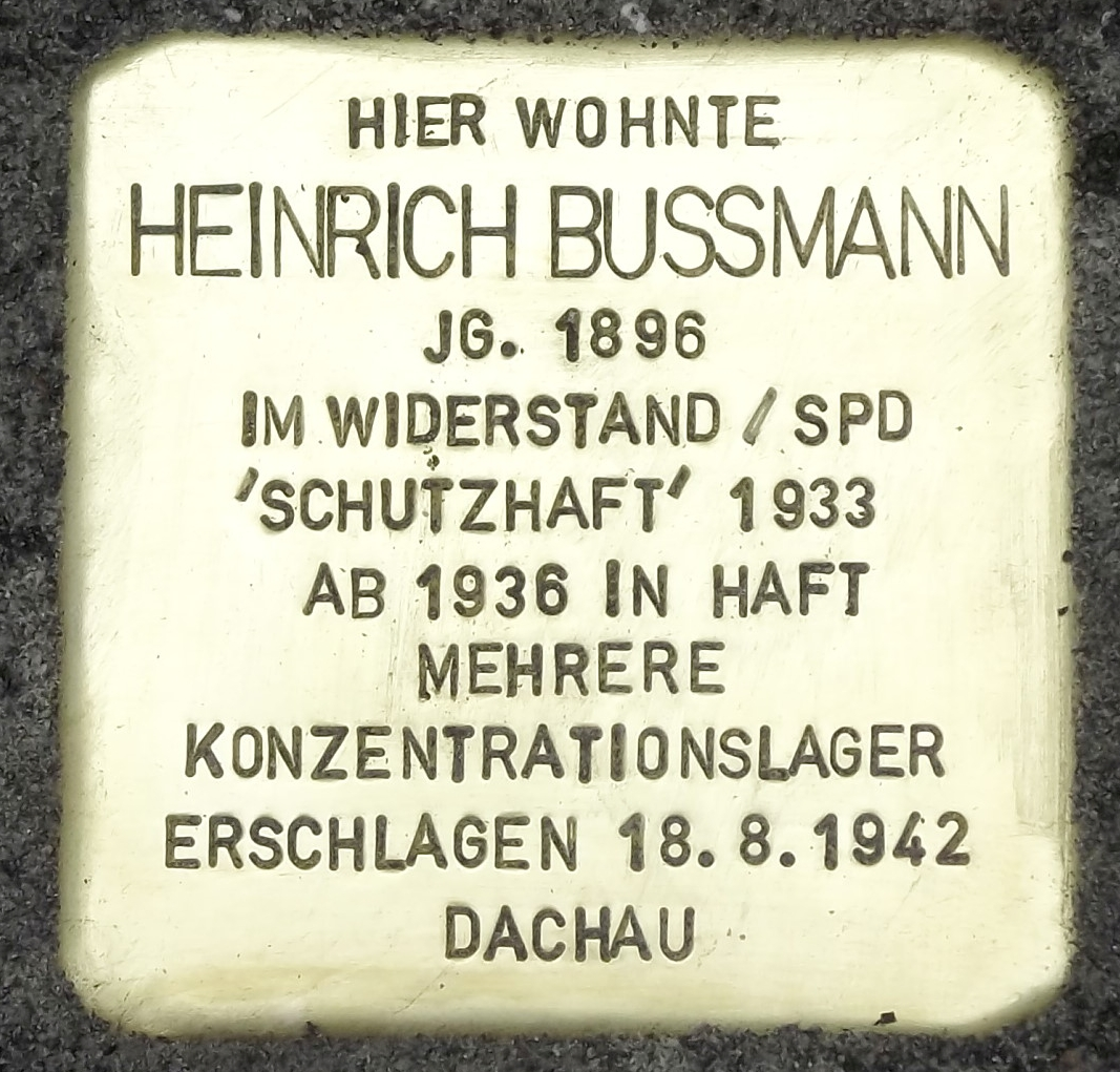 Stolperstein seit 2014 in Lünen Heinrich Bussmann